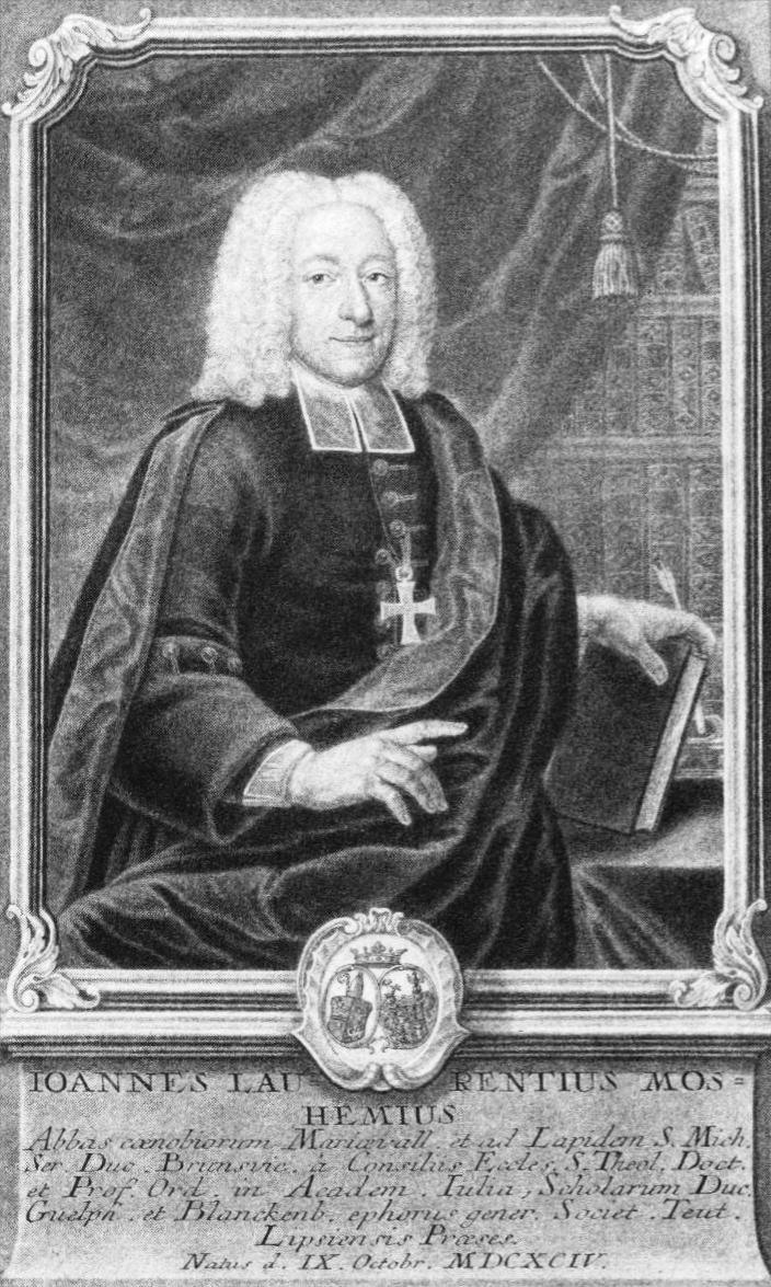 Johann Lorenz von Mosheim (1694-1755), Kupferstich / copper engraving 1735